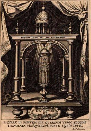 Vierge en chêne brabançais provenant de Montaigu (Belgique). Amenée au Prieuré de Notre-Dame de Bellefontaine le 19 août 1629 par Philippe CHIFFLET. Depuis le 30 juillet 1925 elle se trouve à l'église de Pin